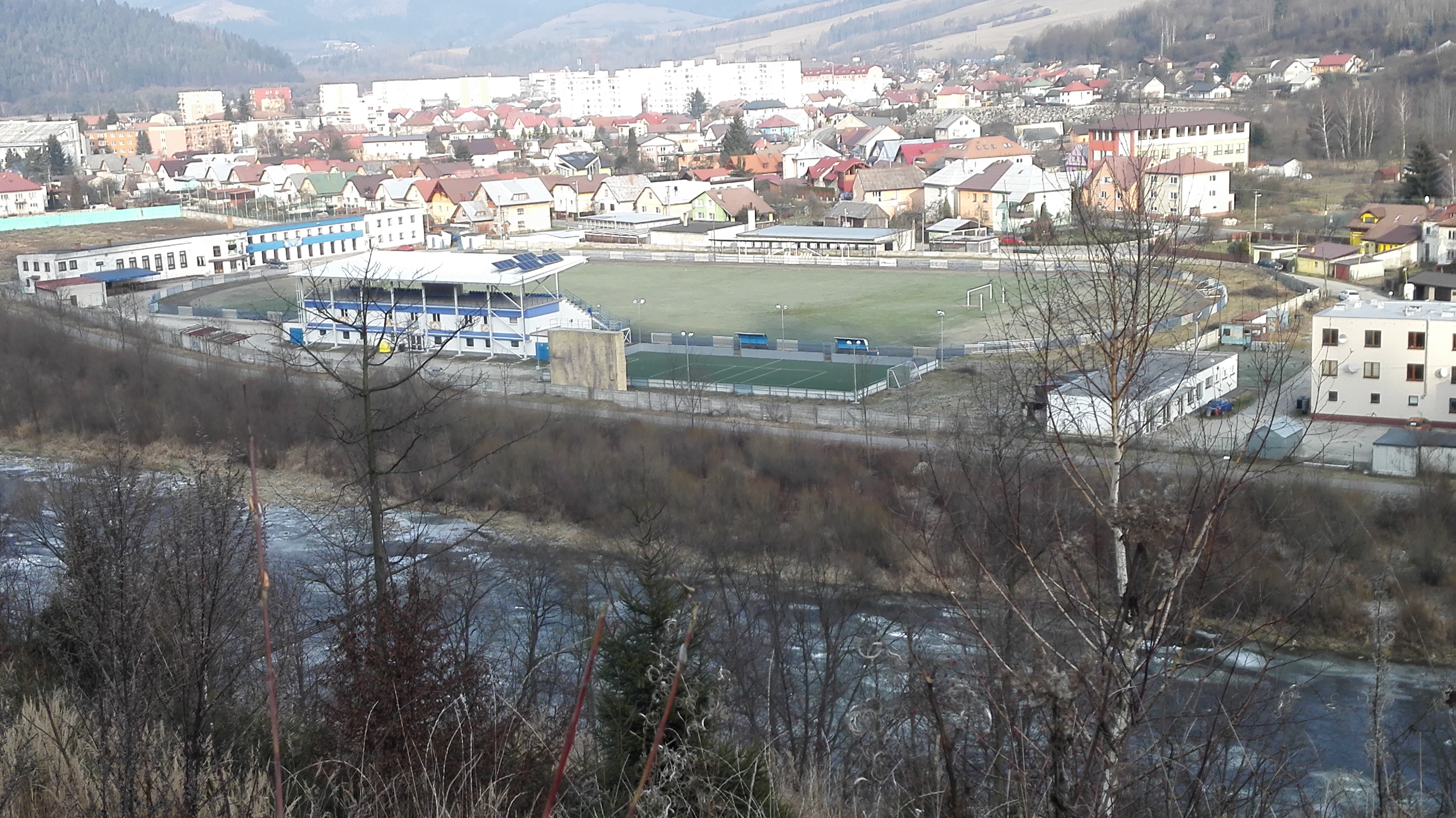 Pohľad na futbalový štadión Tatrana Krásno nad Kysucou z kopca diel na pravom brehu rieky Kysuce